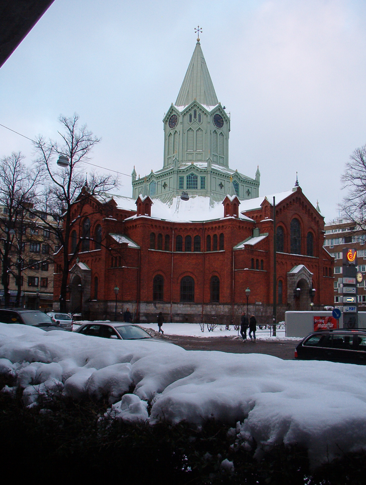 Caroli kyrka, Malmö, 2.jpg Date: December 2005